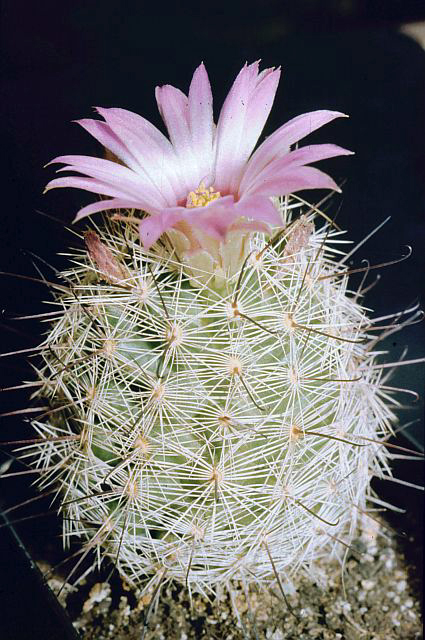 Mammillaria wrightii ssp. wilcoxii (syn. Mam.meridiorosei